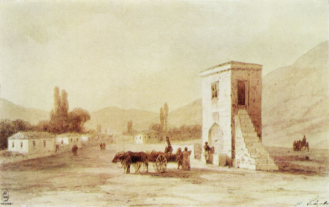 Старый Крым. Фонтан. 1858 Бумага, сепия.14,3х22,7см. Государственный Русский музей, Санкт-Петербург